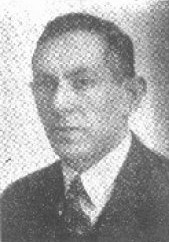 Ota Ginz, český esperantista a úředník